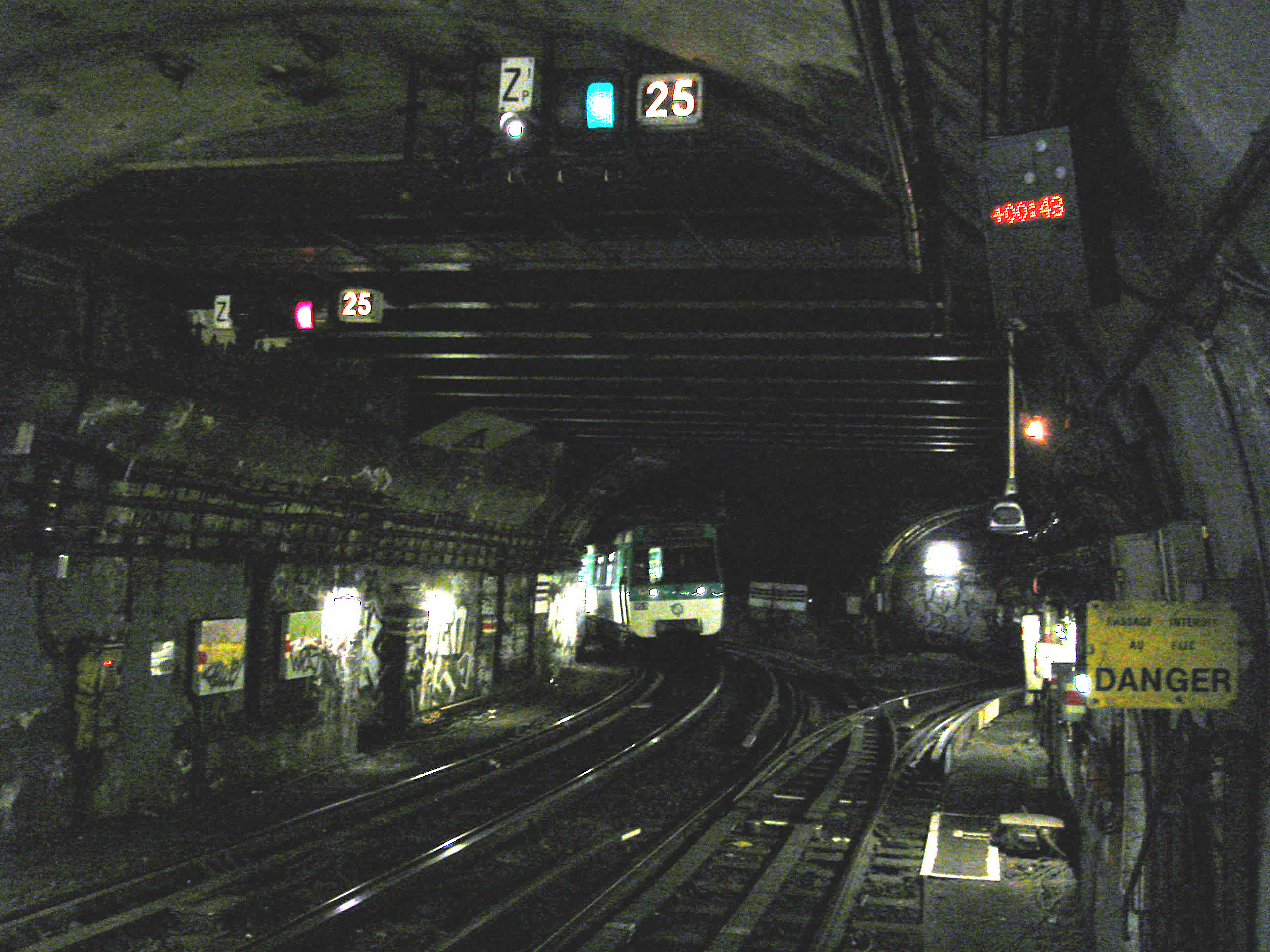 Bifurcation de la ligne 13 du métro de Paris à la station La Fourche, France.